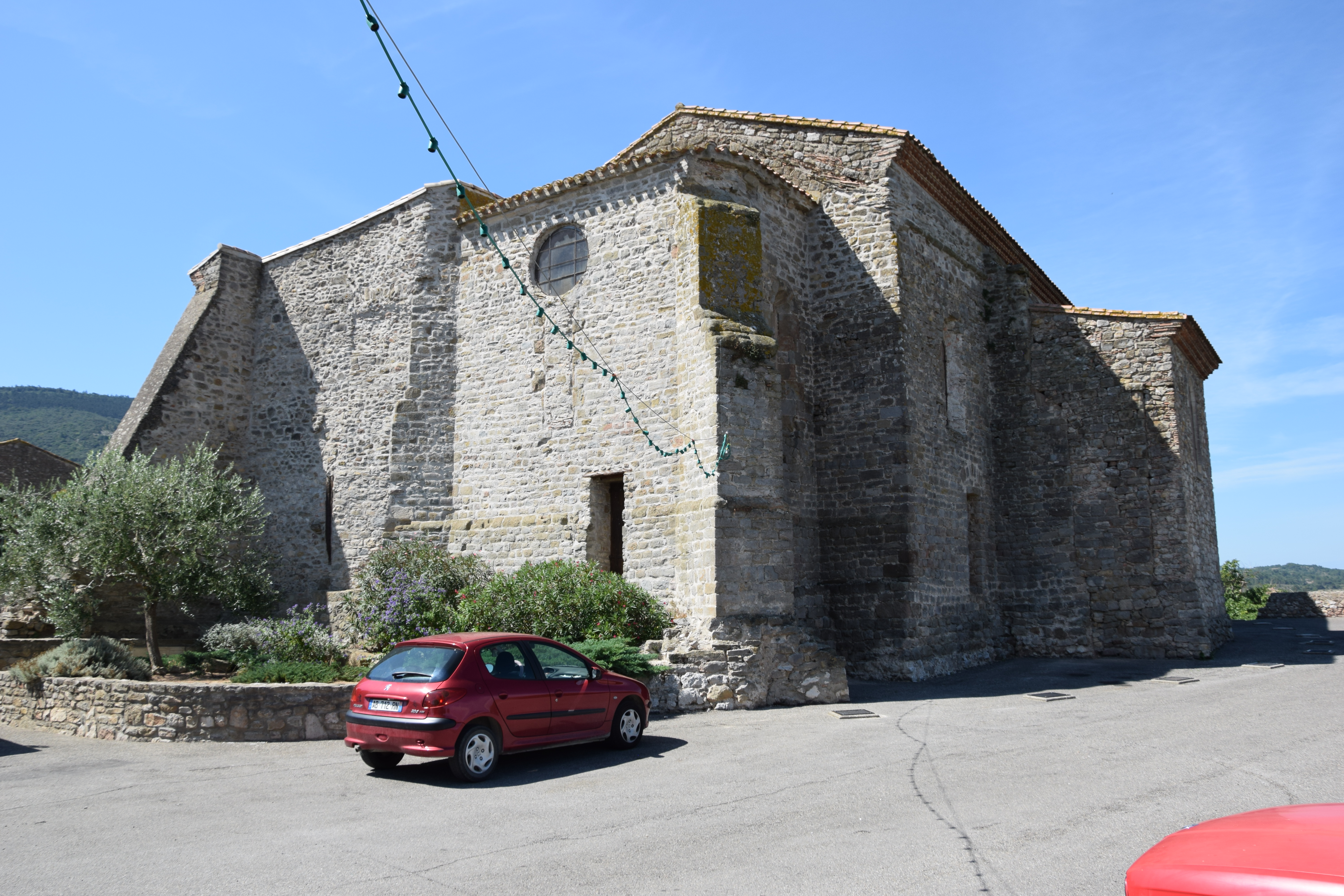 Église Saint-Julien à Barbaira .